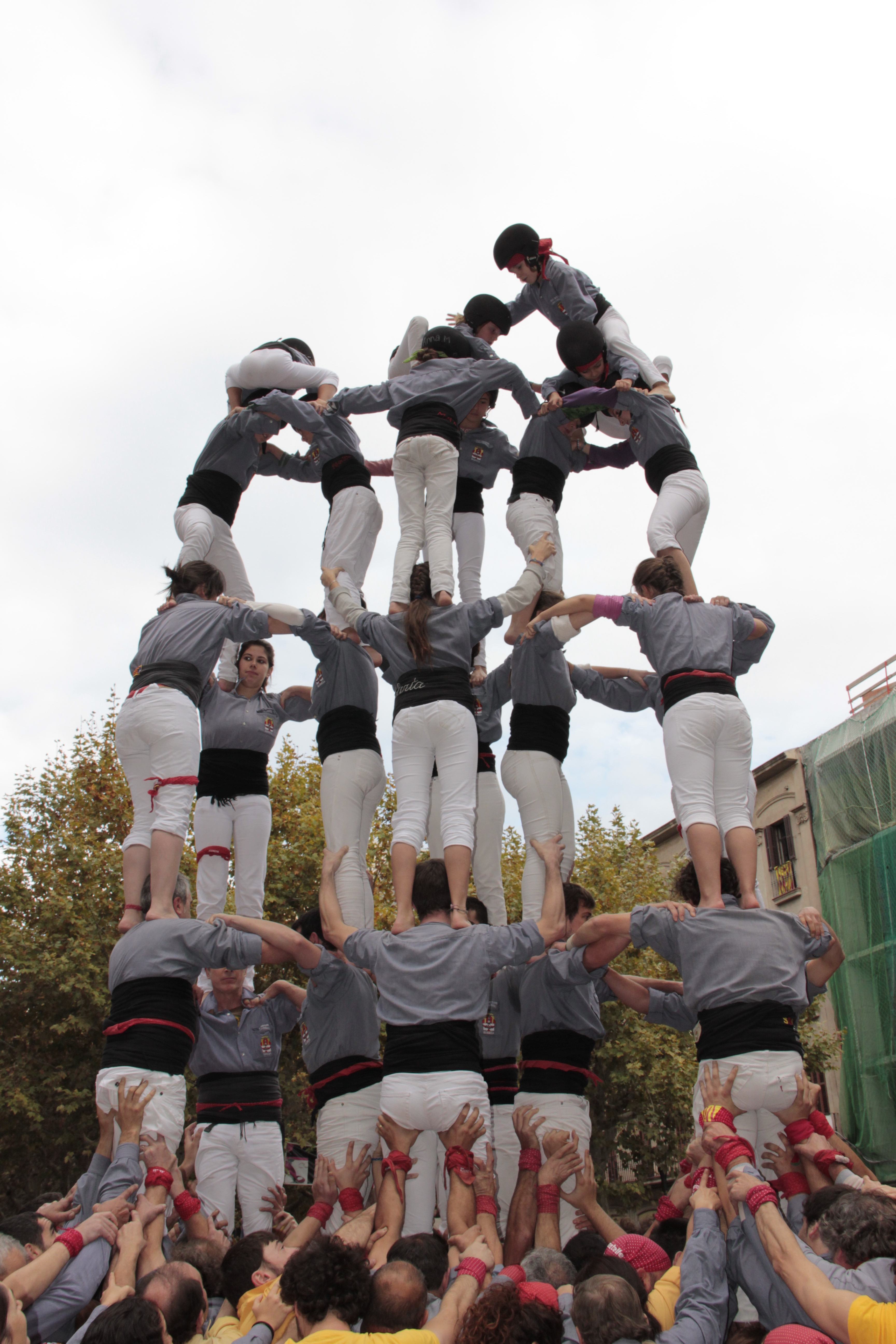 Primer 8 de 6 de la història, realitzat amb dues estructures de tres adossades per una torre central. Va ser descarregat per primera vegada l'11 de novembre del 2012 pels Tirallongues de Manresa a la plaça de Crist Rei de Manresa, en la XXa Diada dels Tirallongues.